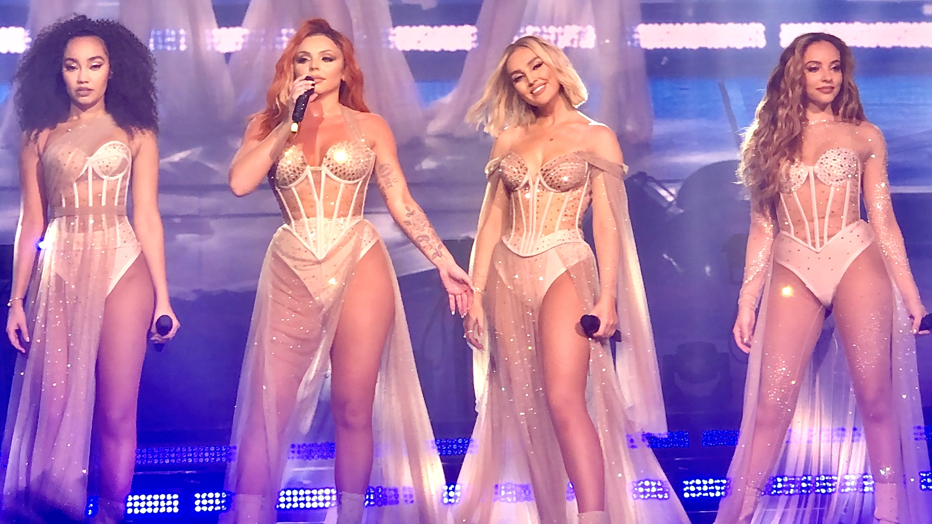 Les Little Mix performant Told You So durant leur concert au Dome De Paris, pendant leur tournée du LM5 tour, le 28 septembre 2019. De gauche a droite, Leigh-Anne, Jesy, Perrie & Jade.